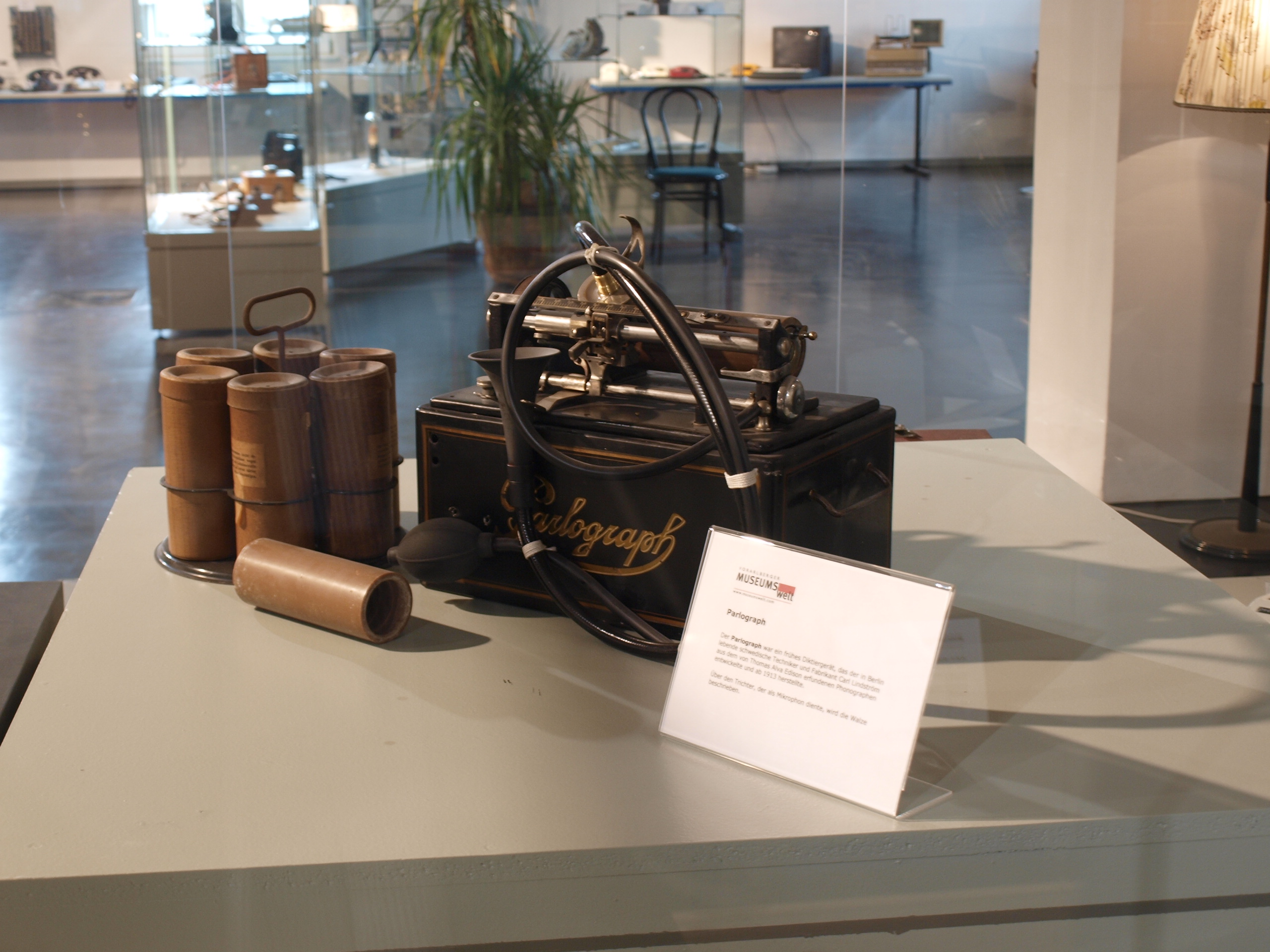 Parlograph (Sprechmaschine) mit Wachswalzen als Speichermedium im Elektromuseum in Frastanz.